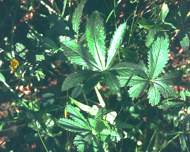 Potentilla thuringiaca eF